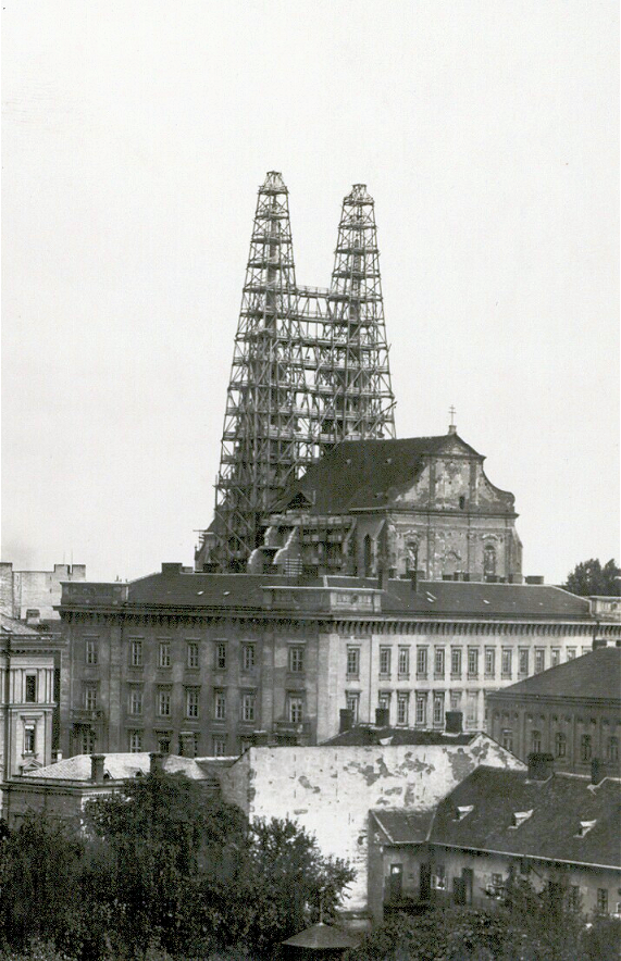 Petrov, chrám sv. Petra a Pavla v rekonstrukci s věžemi v lešení, pohled od Pekařské přes tzv. Městský dvůr 114. Soubor fotografií uložených v albu, tzv. Bruna Antiqua. Brno : s.n., mezi 1904 a 1905.